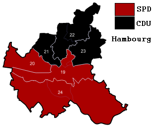 Hambourg et ses districts en 2009.